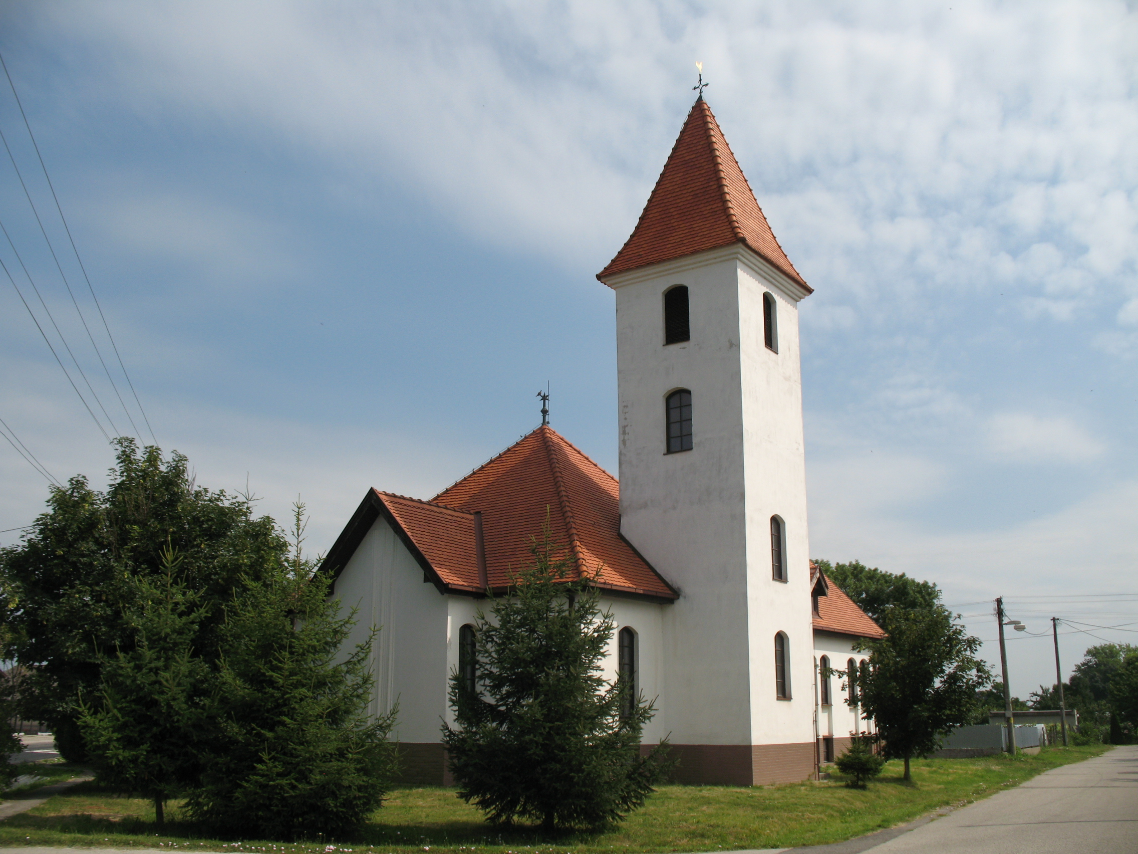 Bögellő